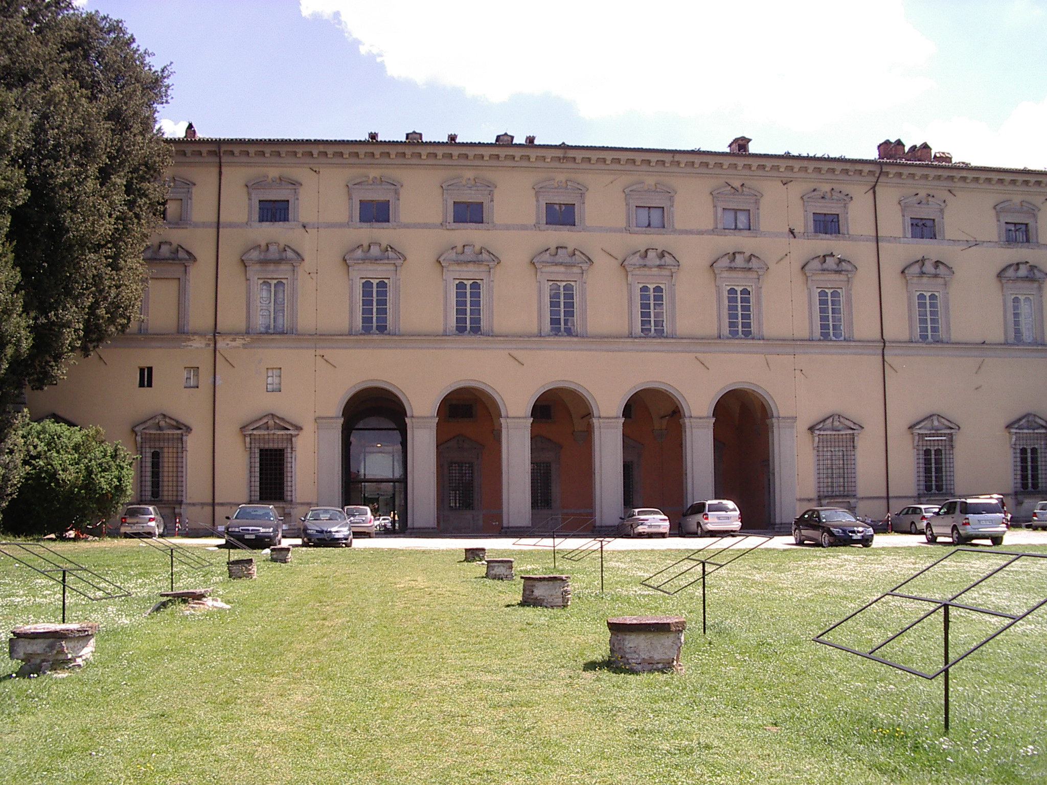 Città di Castello Ombrie Italy Palazzo Vitelli